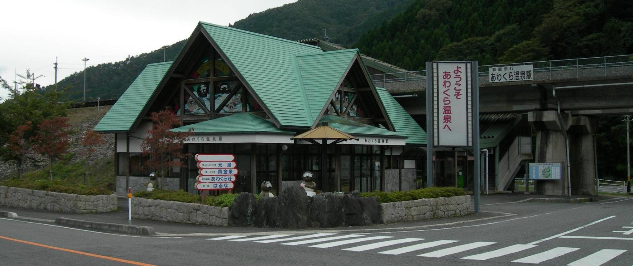 あわくら温泉駅、投稿者が2007年10月13日撮影。